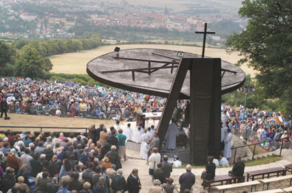 Na Mariánsku púť do Levoče prichádza každý rok niekoľko sto tisíc pútnikov. (en: Levoca Pilgrimage Attracts annuly hundreds thousands pilgrims.)